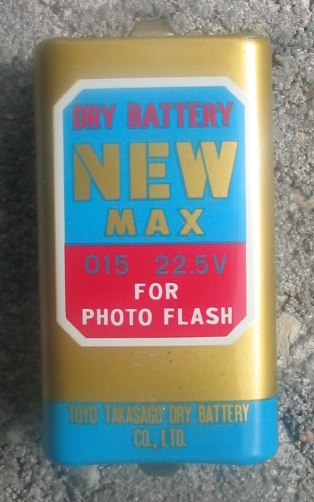 Een O15 22,5 V batterij